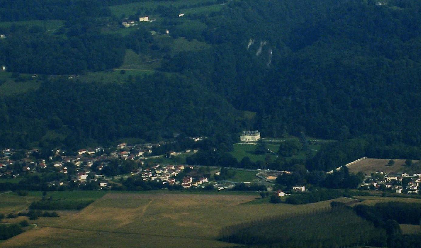 Tencin vu depuis St Hilaire du Touvet pendant la Coupe Icare 2008.